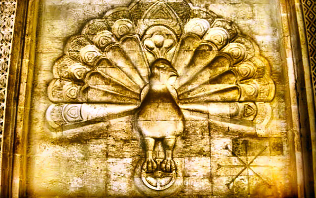 L'archange yezidi